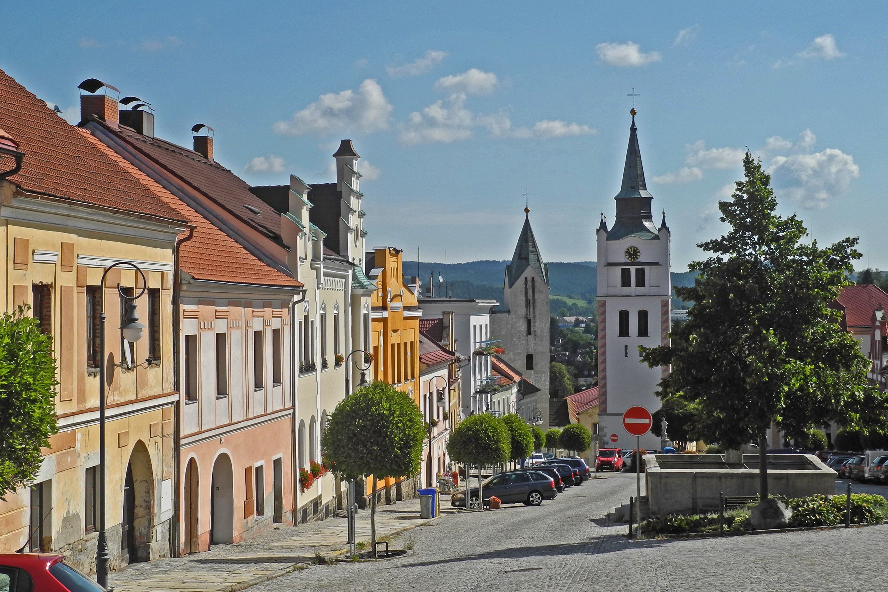 Bürgerhäuser am Markt in Winterberg (Vimperk) im Böhmerwald